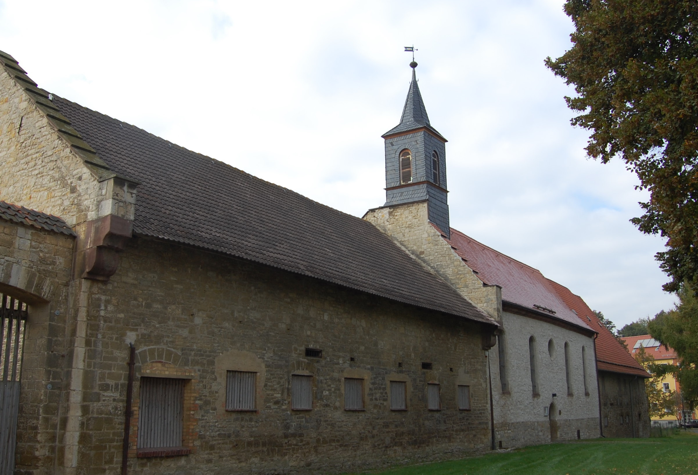 Sankt-Stephan-Kirche Klostergut Winningen